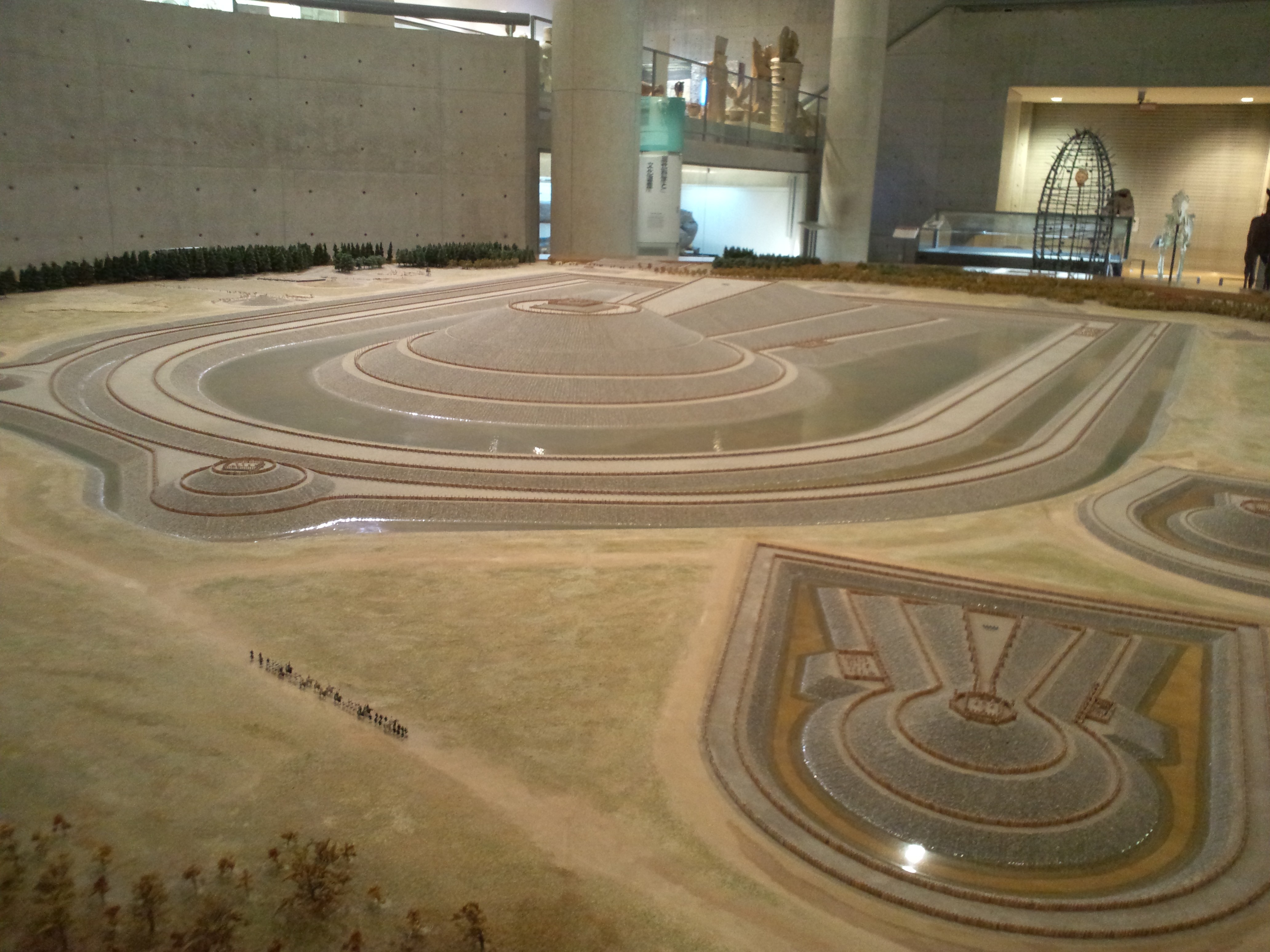 大仙陵古墳の復元模型